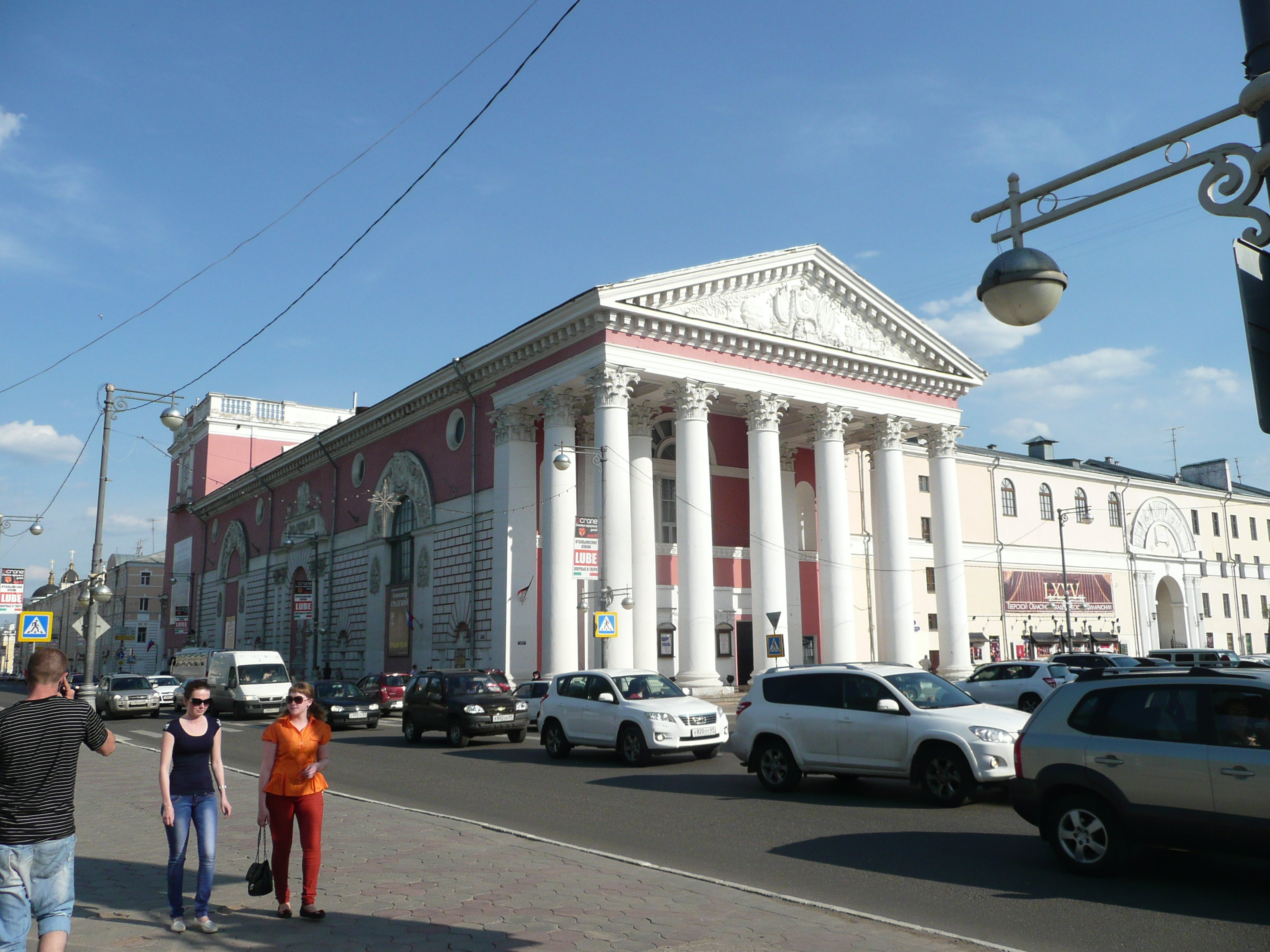 Здание областного Драматического театра (Тверская область, Тверь, Советская улица, 16 (18), Свободный переулок, 43)